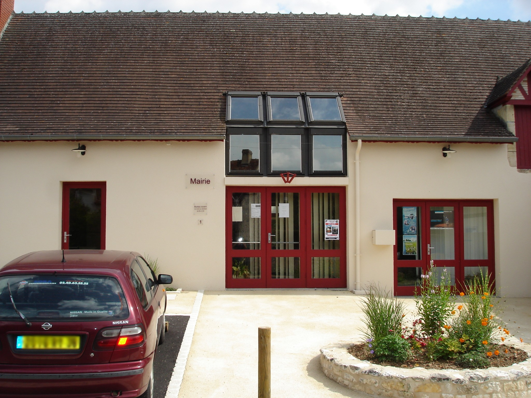 Preuilly-la-Ville (36) : La mairie.